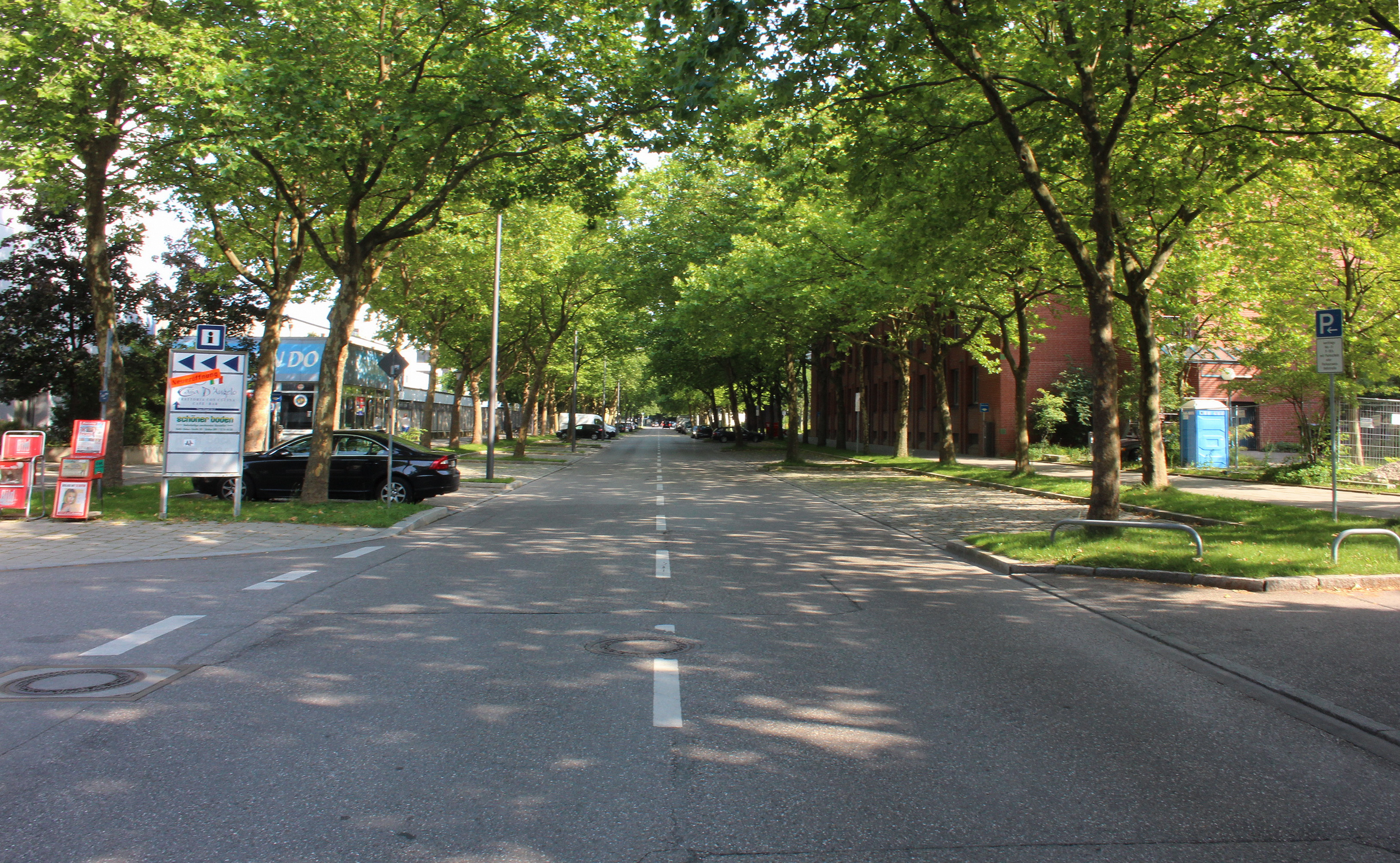 Infanteriestraße in München. Anwohnerparkbereich mit leeren Parkplätzen. Parken ist dort kostenpflichtig, Anwohner gibt es in dieser Straße fast nicht.